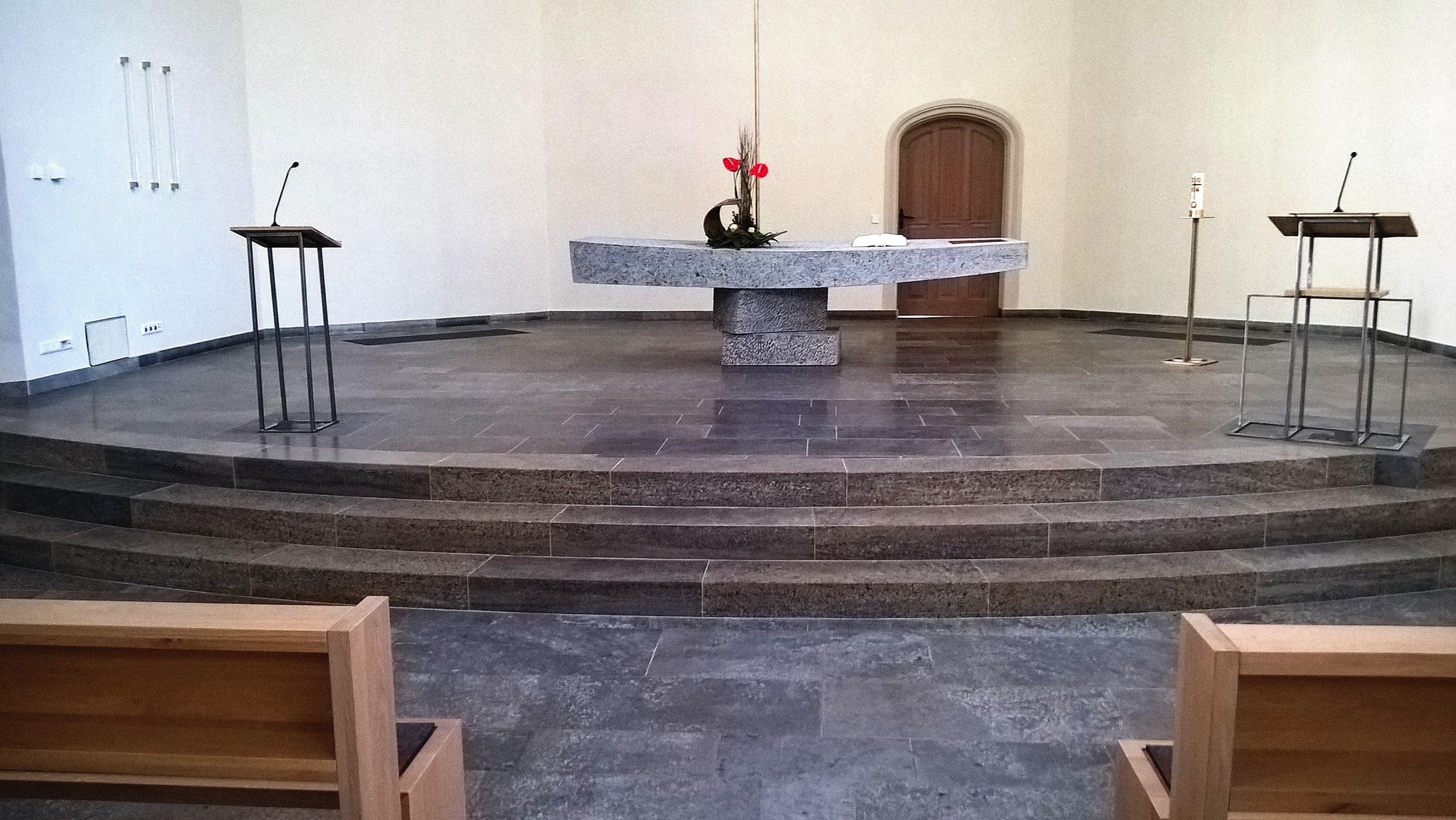 Johanneskirche in Gießen, Hessen, Deutschland